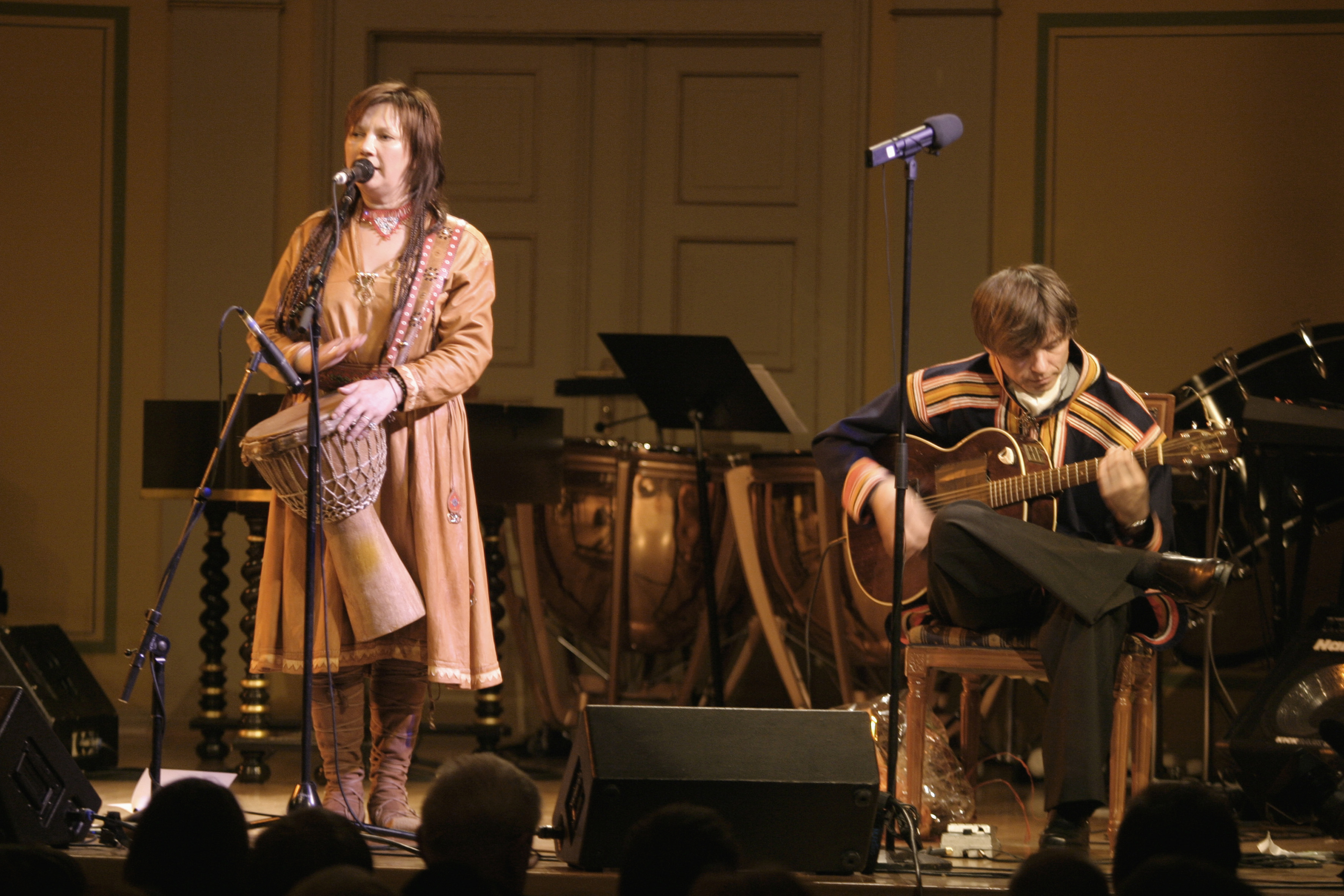 Mari Boine, Nordiska rådets musikpristagare, uppträder vid prisutdelningen (Bilden är tagen vid Nordiska rådets session i Oslo, 2003)